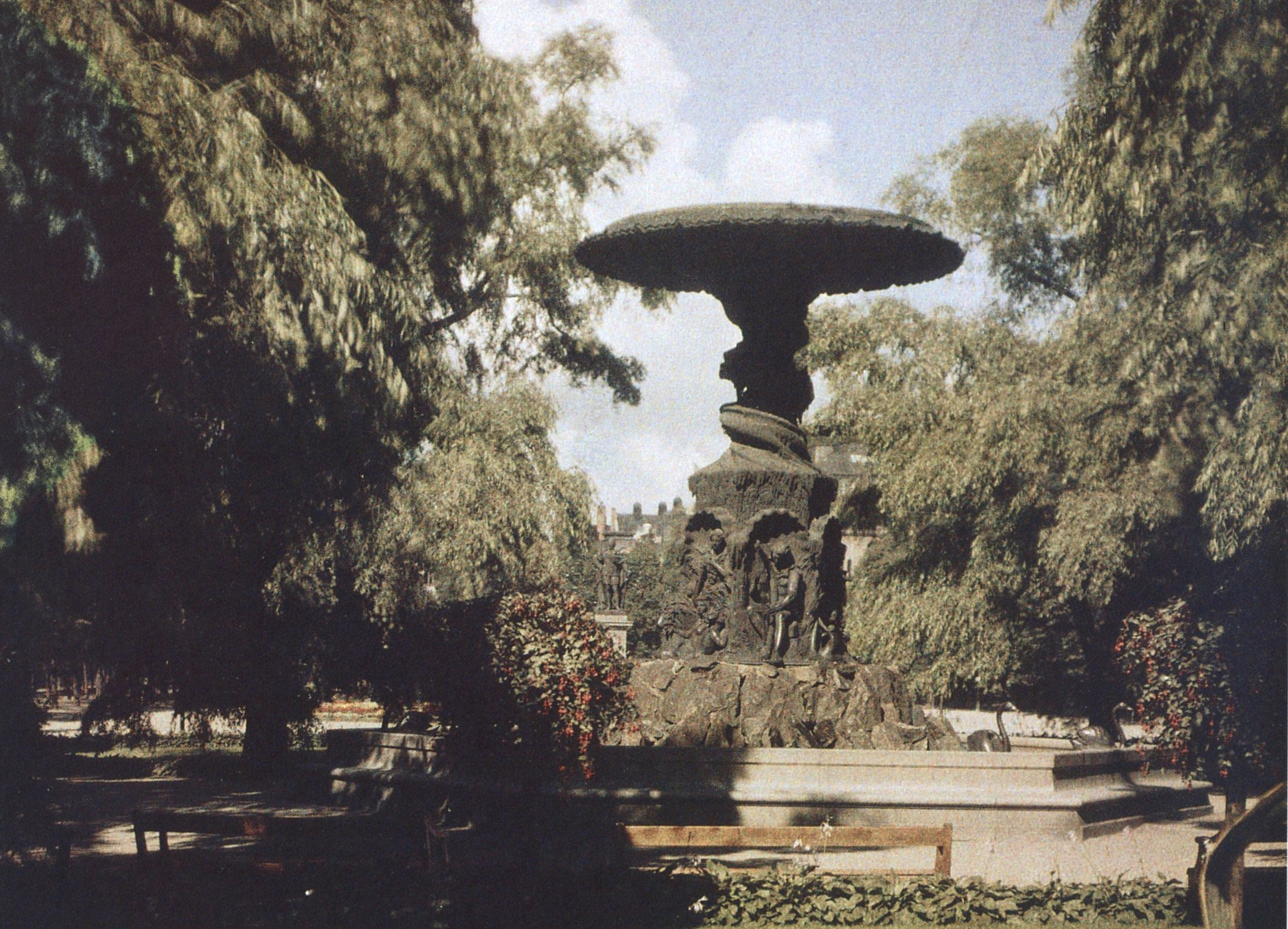 Tidigt färgfotografi på Molins fontän i Kungsträdgården i Stockholm